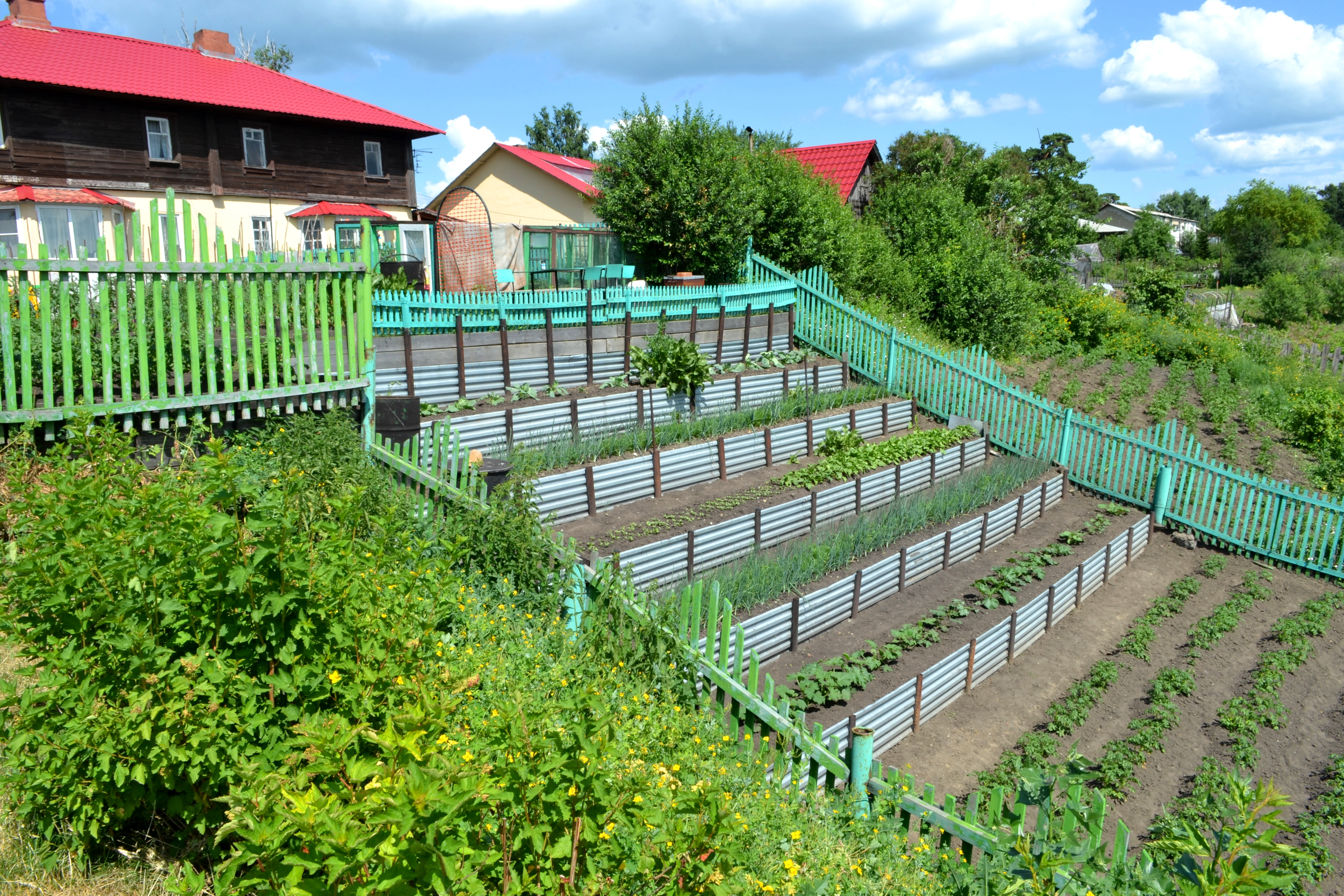 Дом жилой для специалистов автономной индустриальной колонии «Кузбасс» (Кемеровская область, Кемерово, Красная Горка улица, 19)